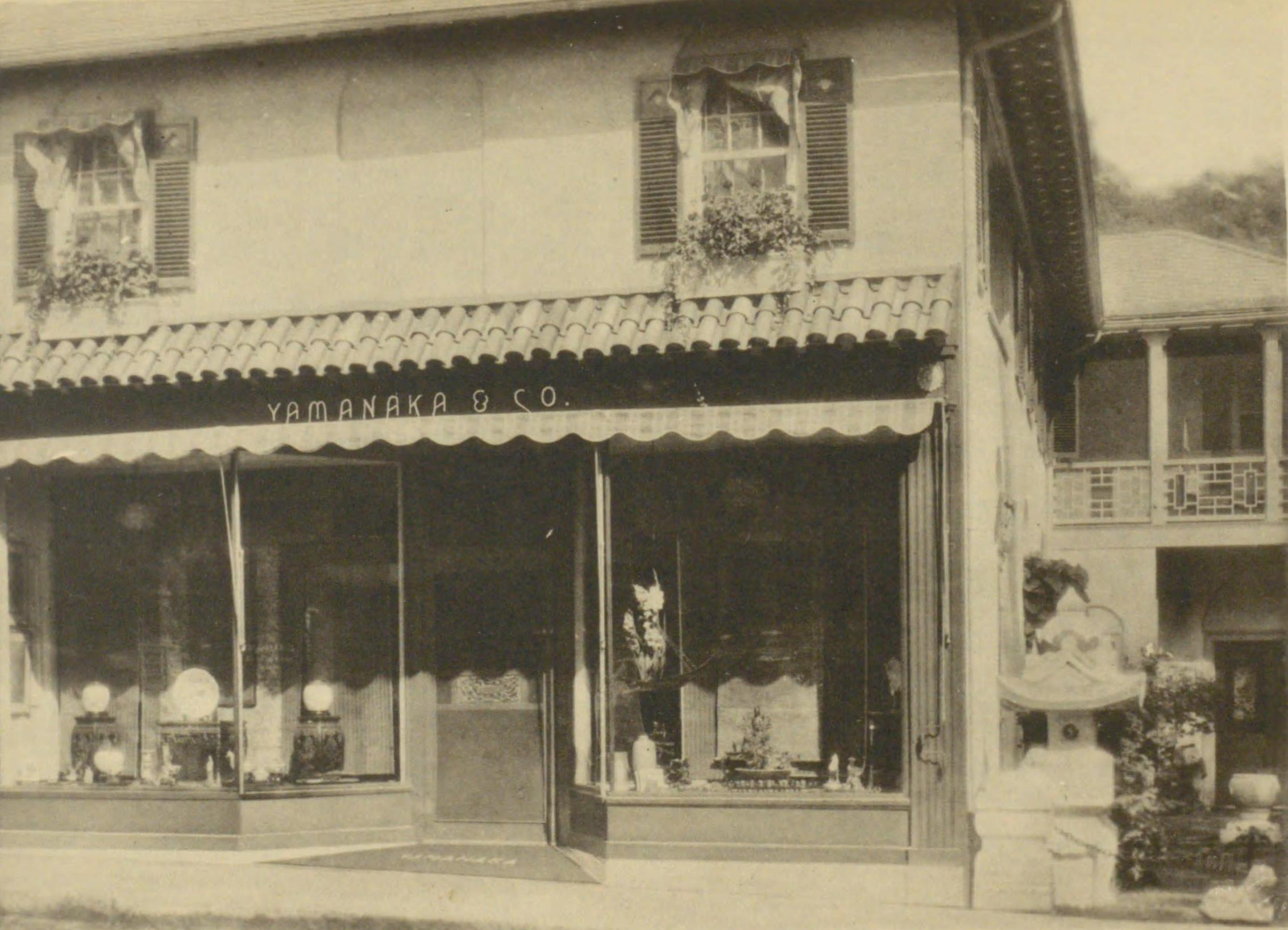 山中商会米国バーハーバー支店